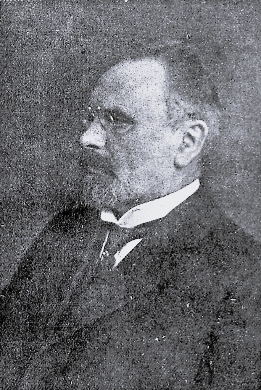 Dem Jenaer Geheimen Rat Pierstorff zum 70. Geburtstag.